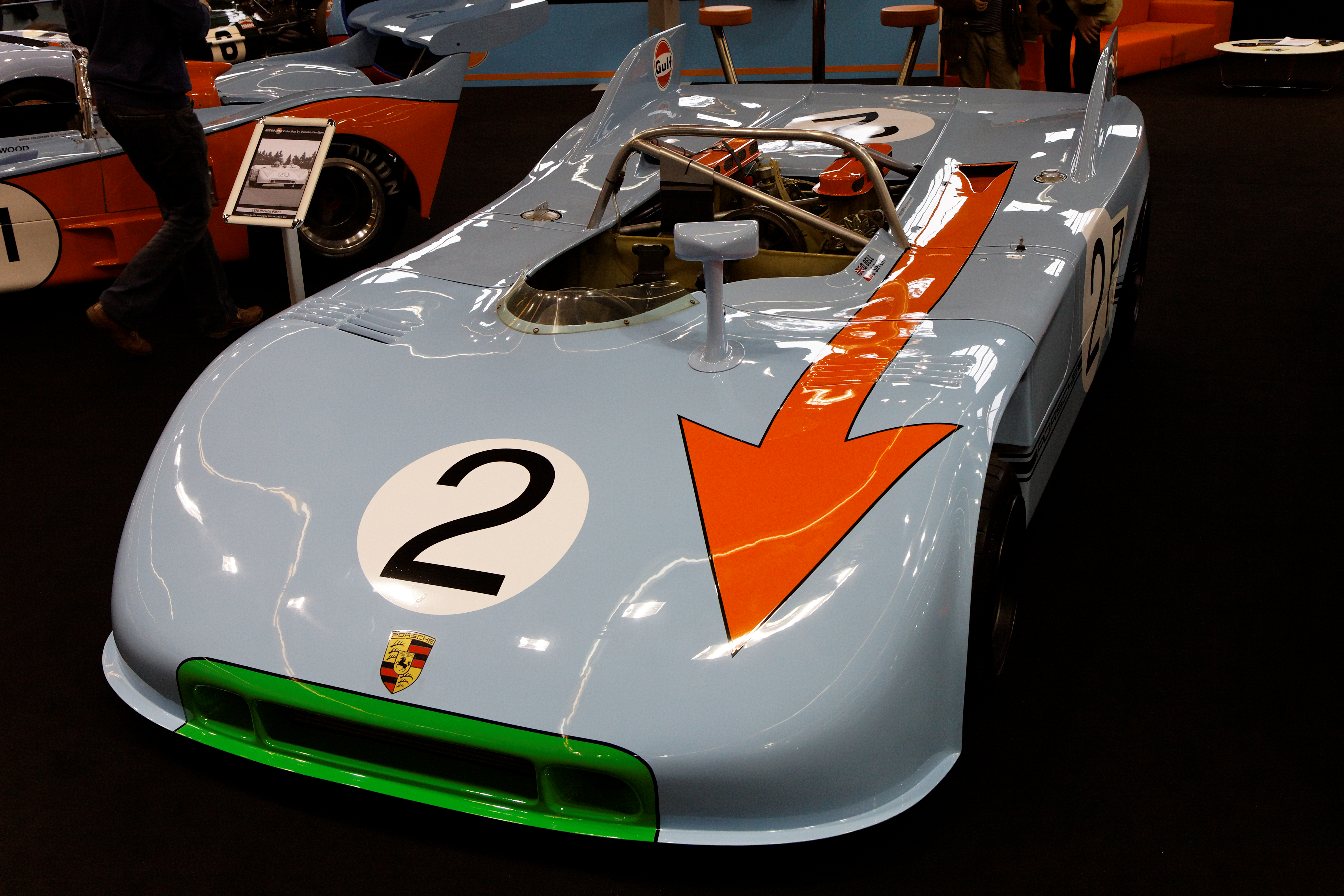 Porsche spider 908/3 (ex-Siffert/Bell) Photographie prise lors du salon rétromobile 2011 à Paris, porte de Versailles.